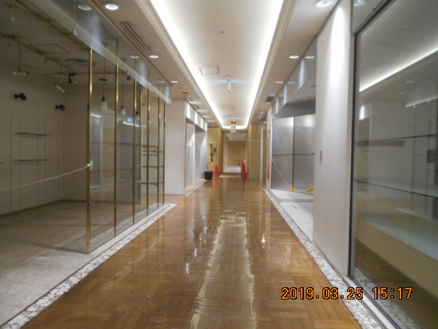 新神戸オリエンタルアベニューの1Fで2019年3月25日に撮影した閑散とした館内です。